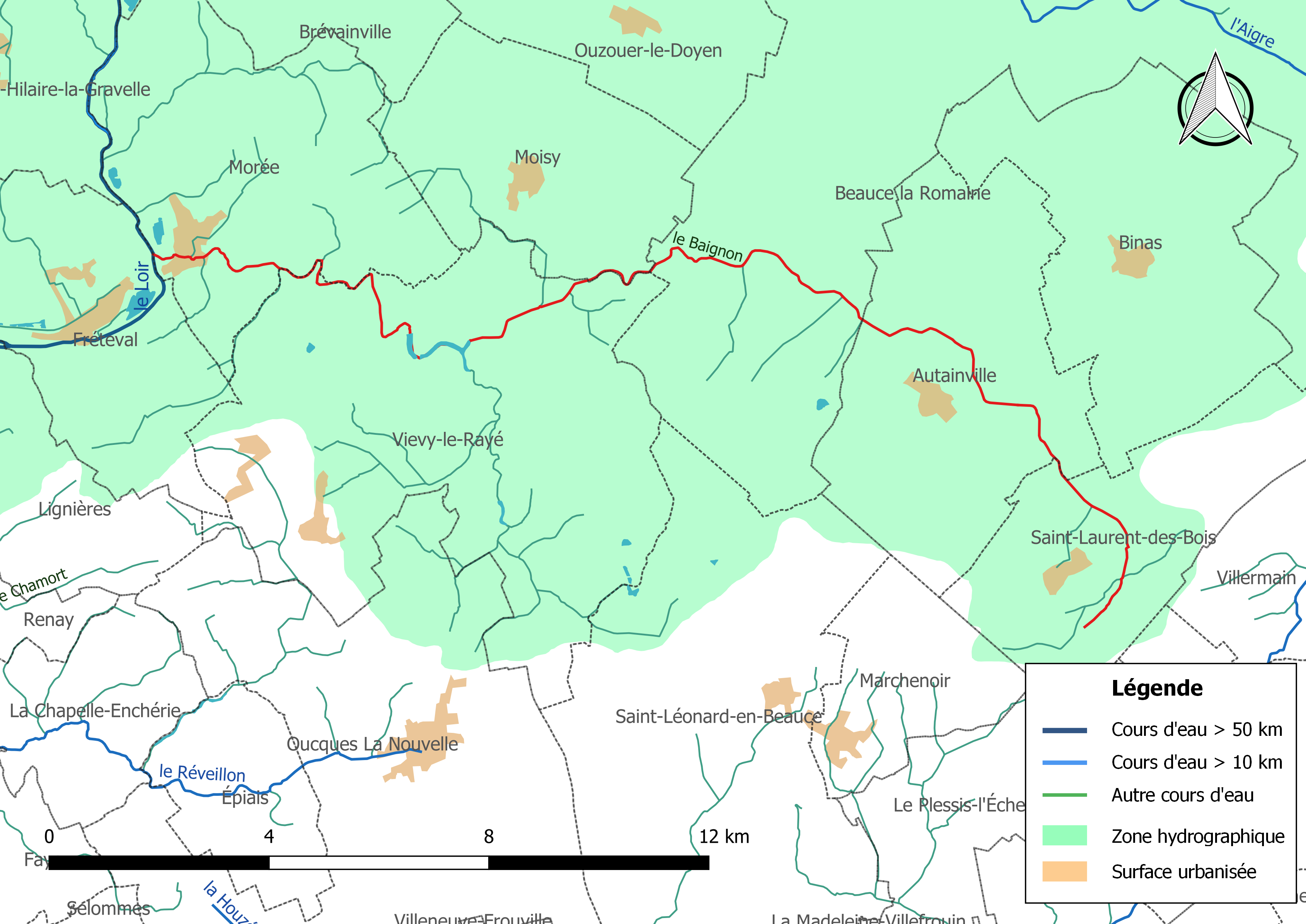 Carte du cours d'eau « le Baignon » et de son bassin versant (zone hydrographique dans laquelle il s'insère).